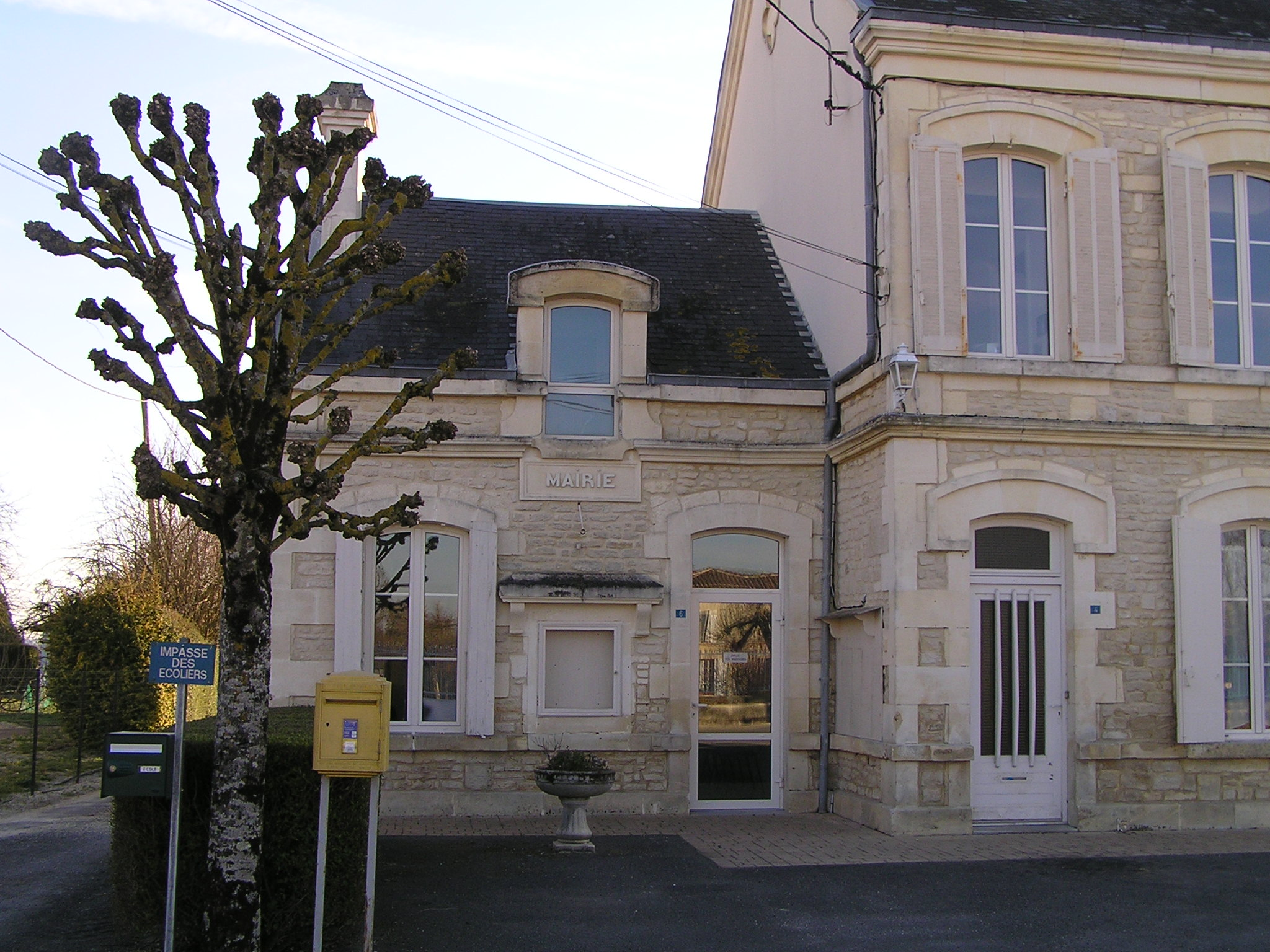 mairie de Mons